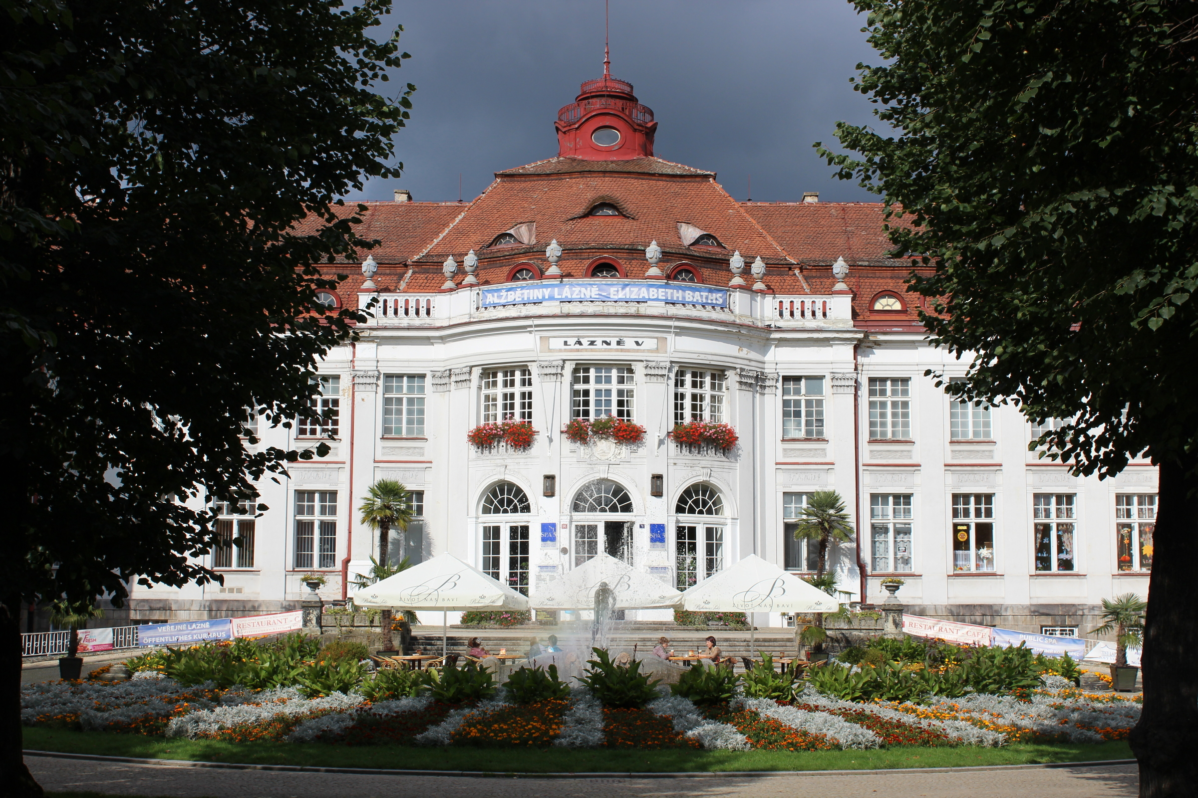 Lázně V. se Smetanovými sady, Smetanovy sady 1145/1, Karlovy Vary.